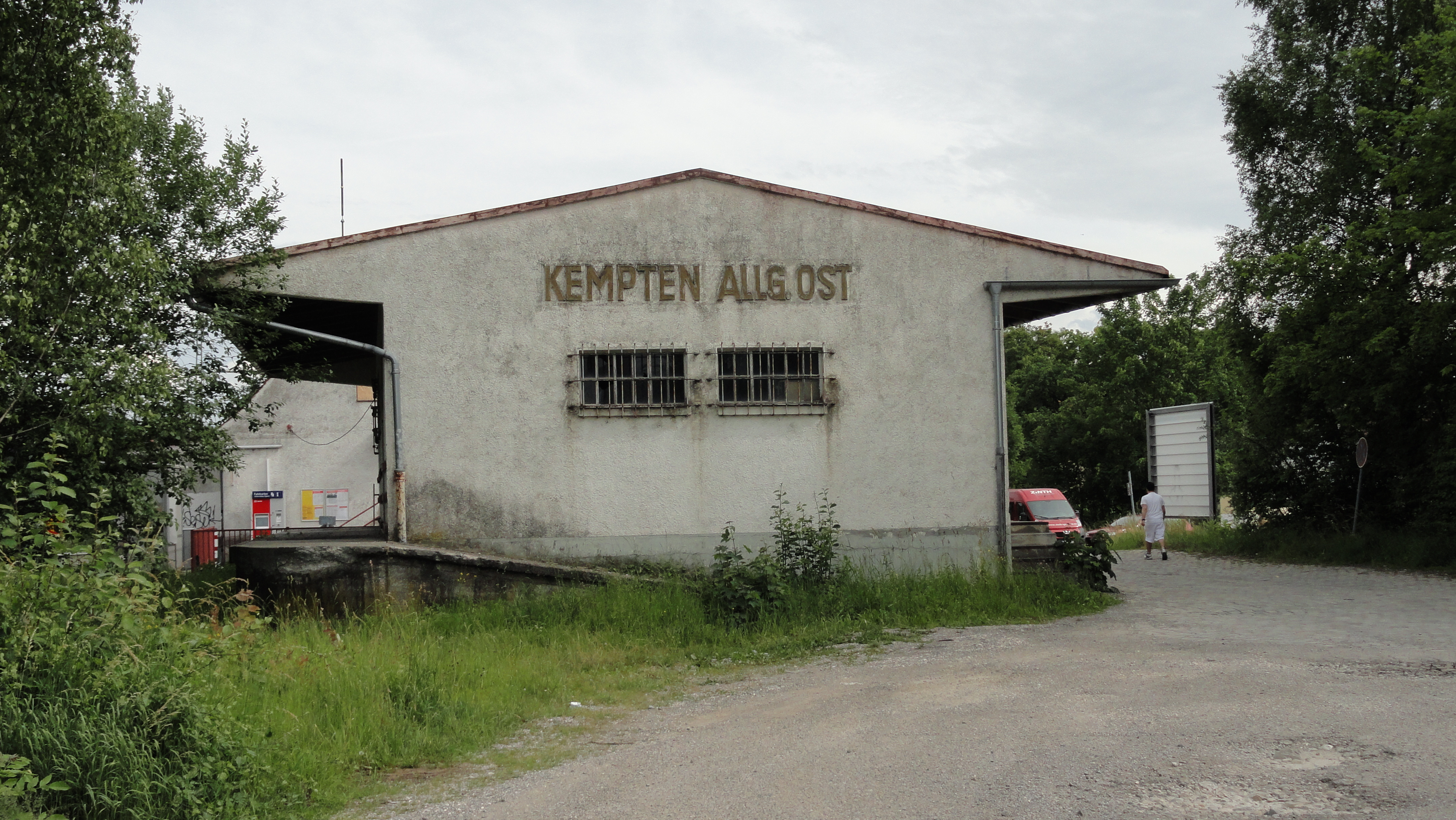 Bahnhof Kempten (Allgäu) Ost